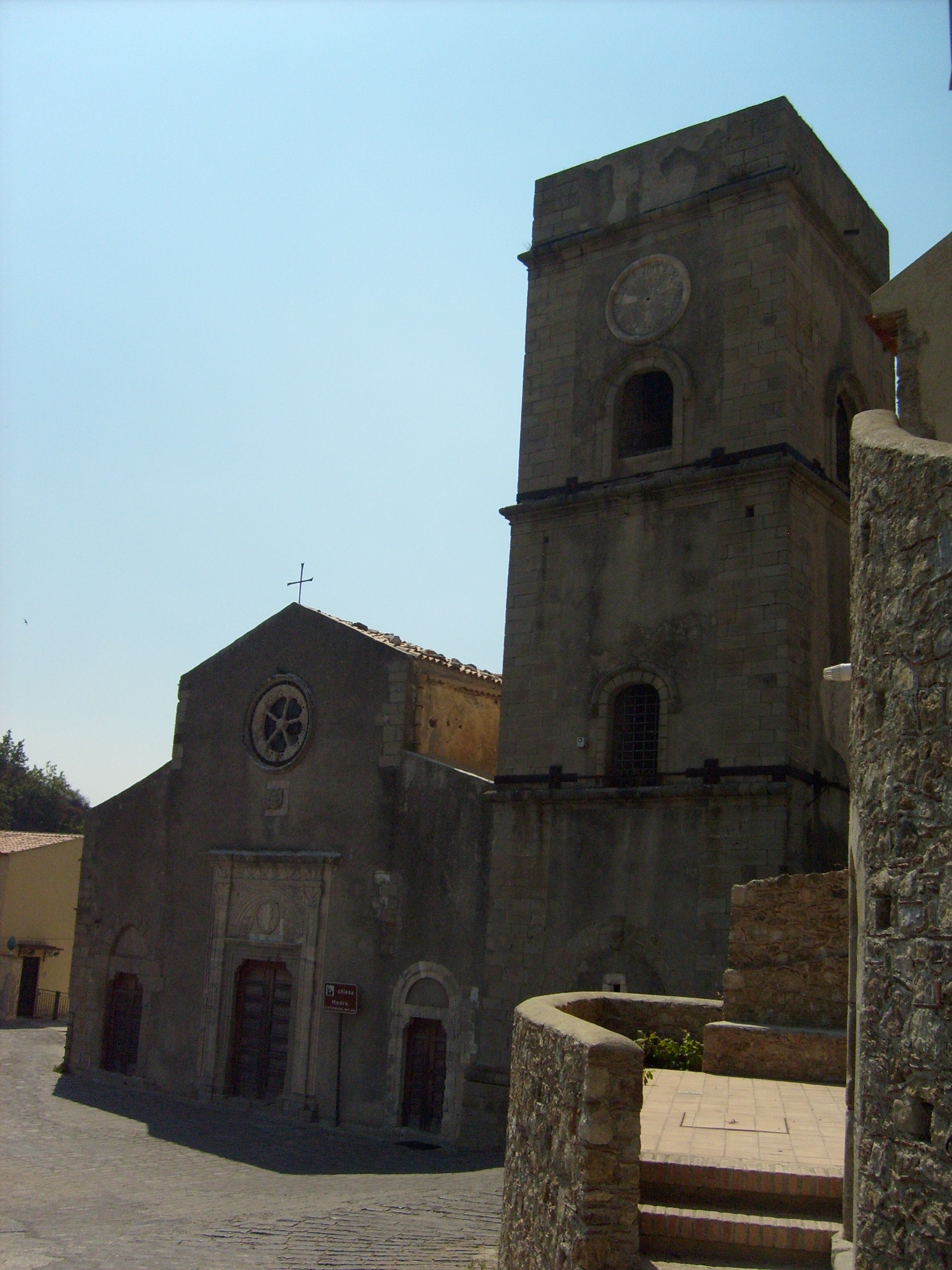 Savoca, prospetto Chiesa Madre